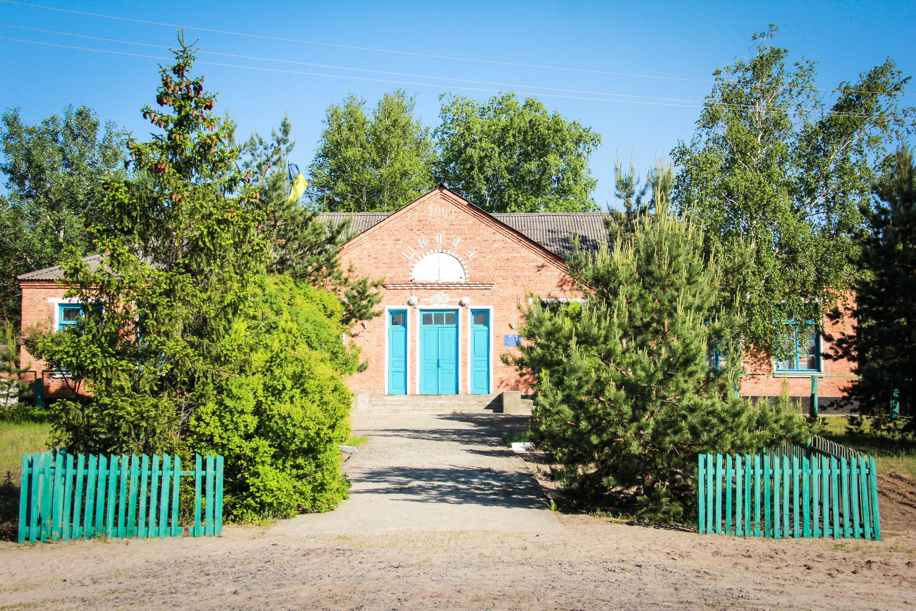 Задінецька загальноосвітня школа I--II ступенів. Заснована у 1965 році.